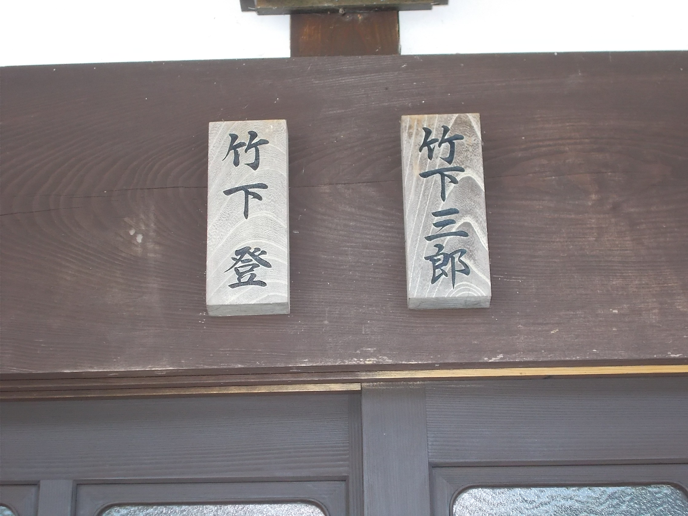 竹下家玄関表札